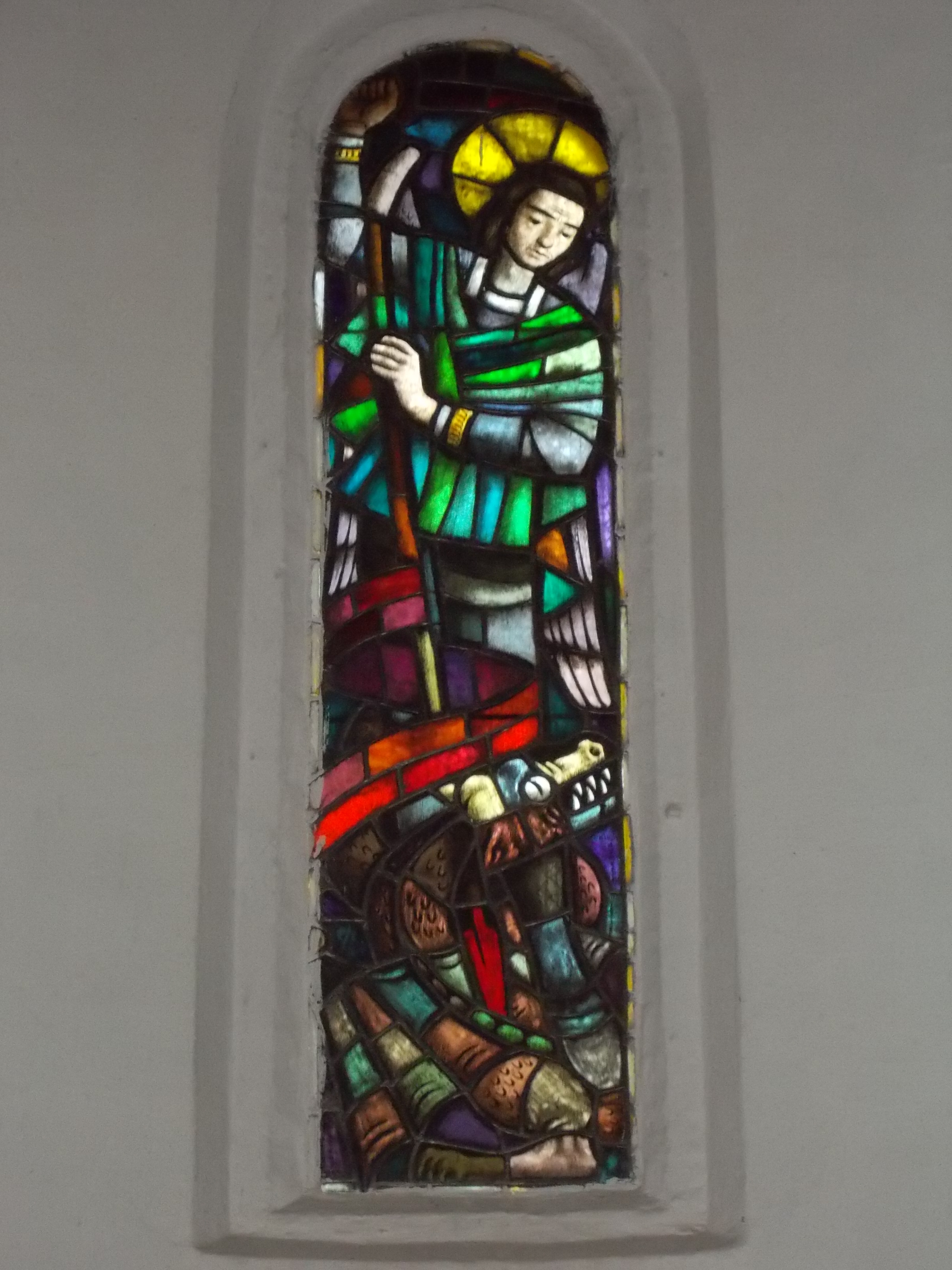 Szent György. Szent Mihály Premontrei templom. Műemlék ID 1196 - Magyarország, Budapest, Margitsziget This is a photo of a monument in Hungary, Identifier: 1196